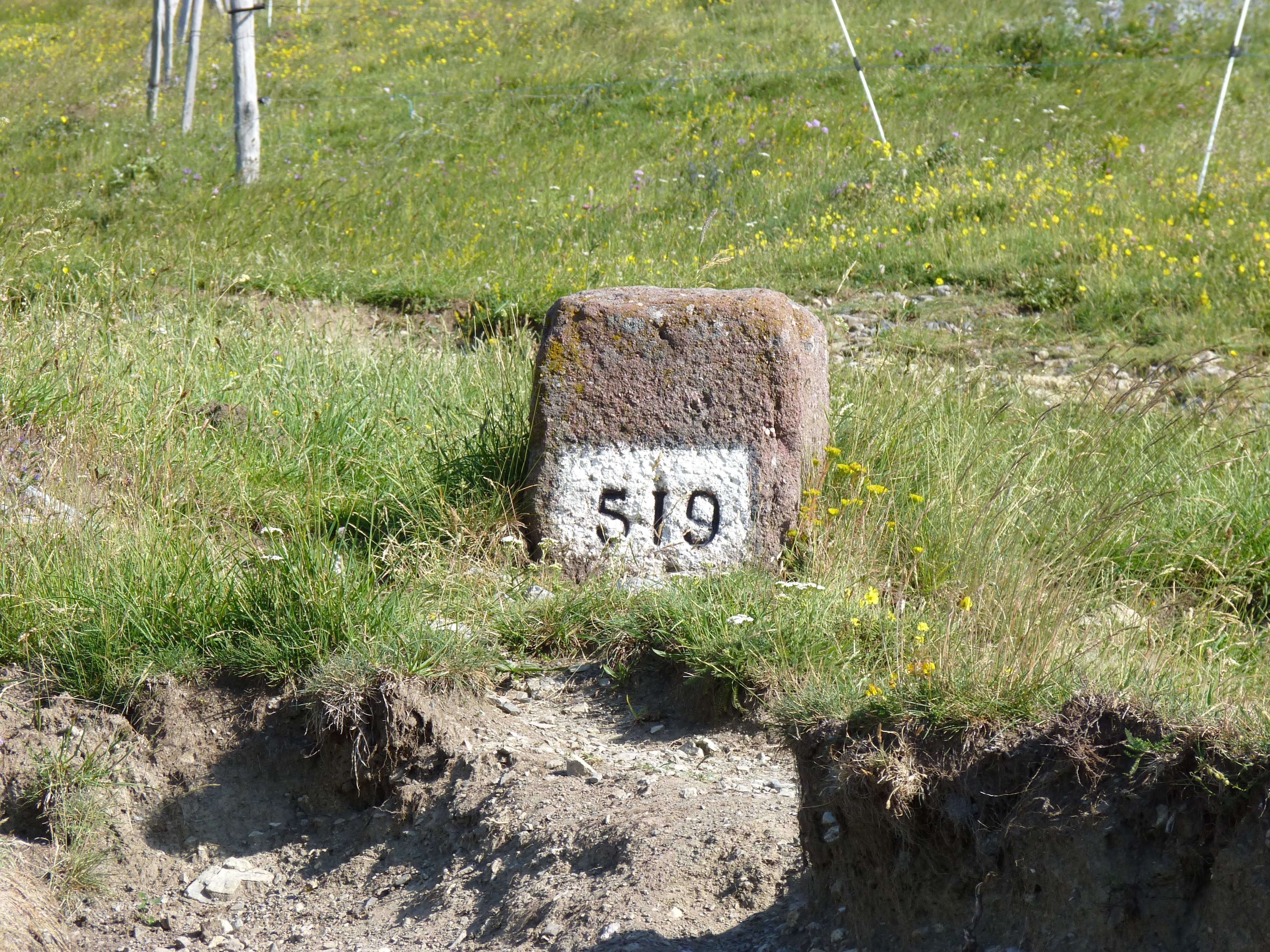 Borne frontière n° 519, col d'Ares, Prats-de-Mollo-La-Preste (Pyrénées-Orientales, Languedoc-Roussillon, France), Molló (Ripollès, Gérone, Catalogne, Espagne)